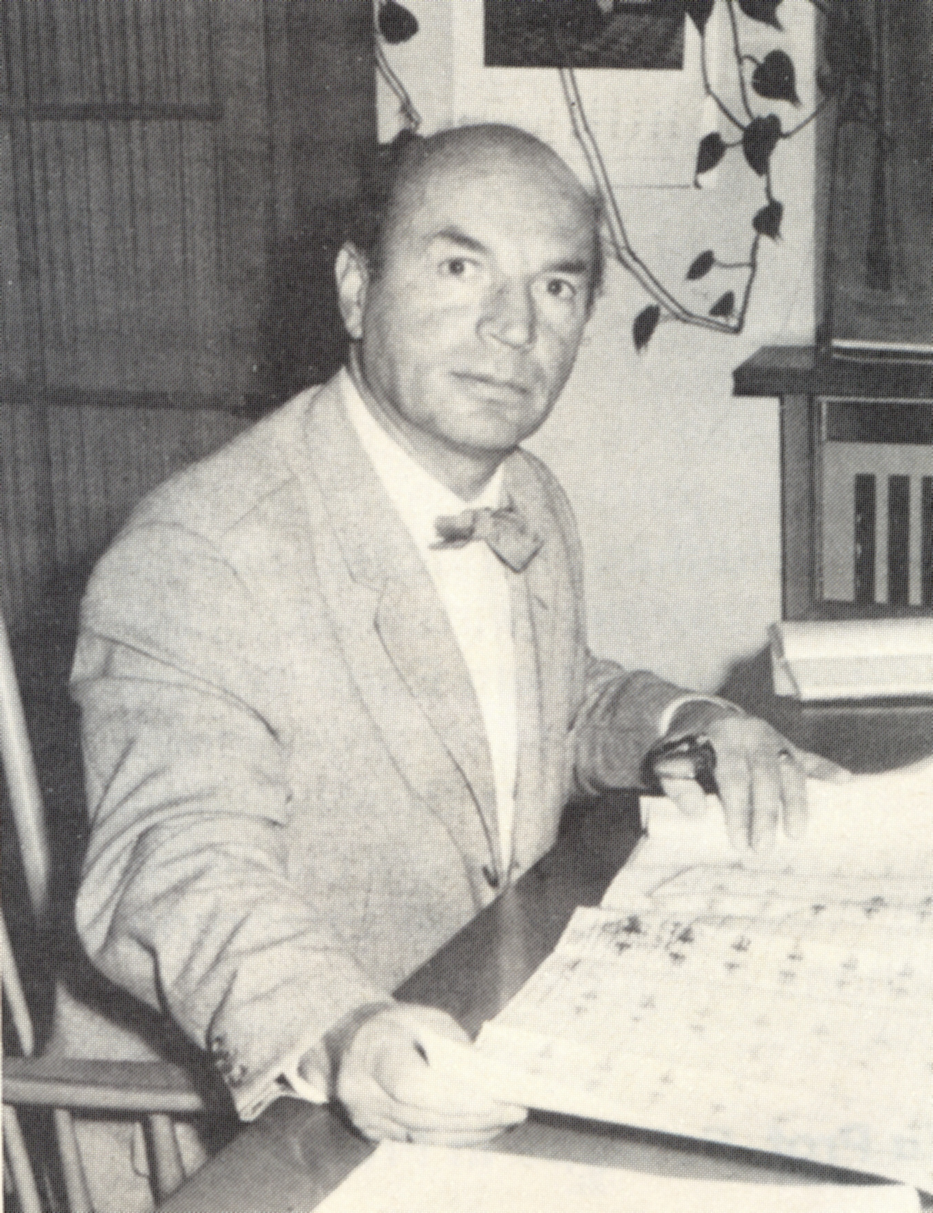 Hans Geiges in seinem Arbeitszimmer im Hochbauamt der Stadt Freiburg im Breisgau ca. 1965